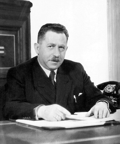 Oskar Judex, vládní komisař/starosta Brna v letech 1939-1945